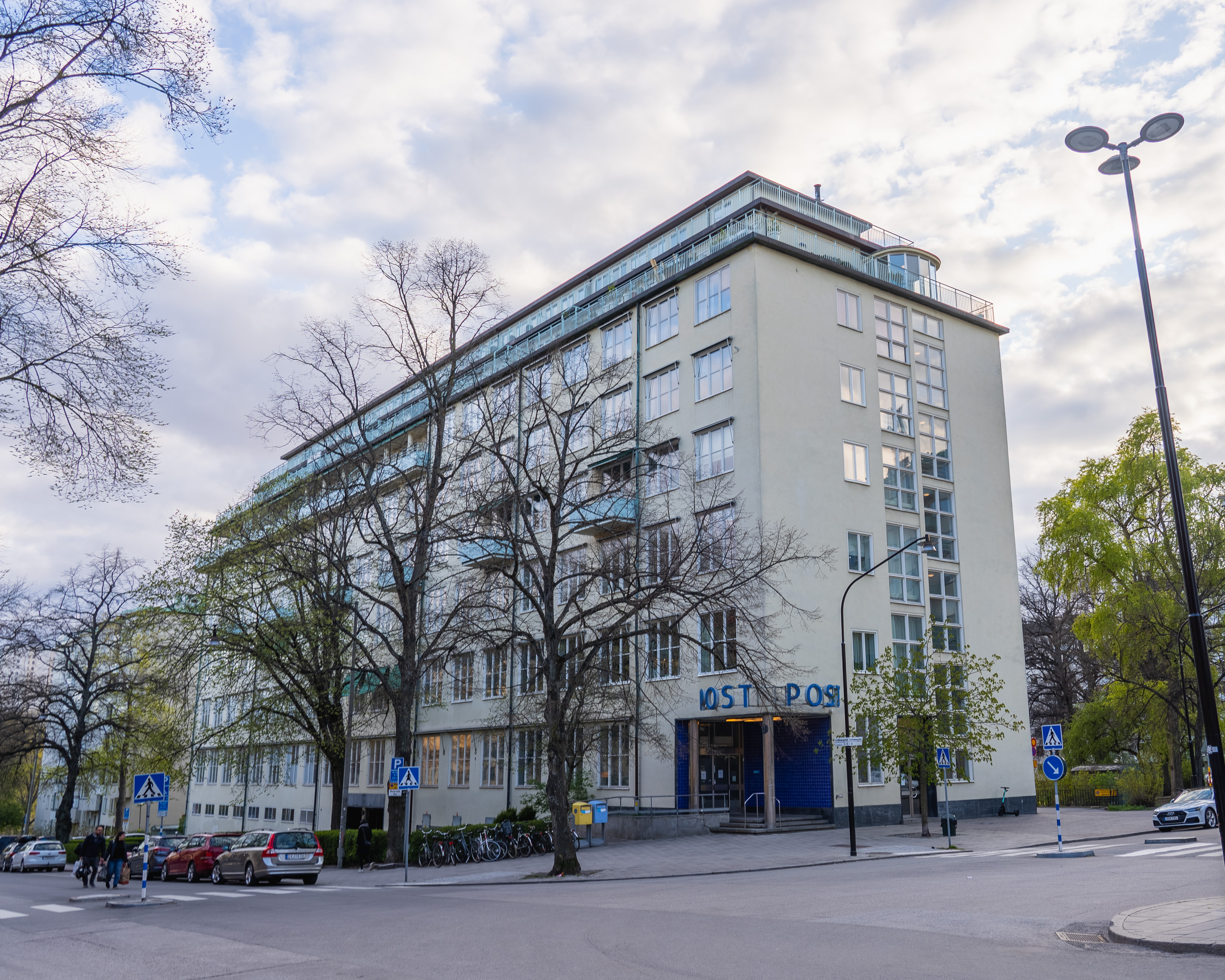 Posthuset Fridhemsplan